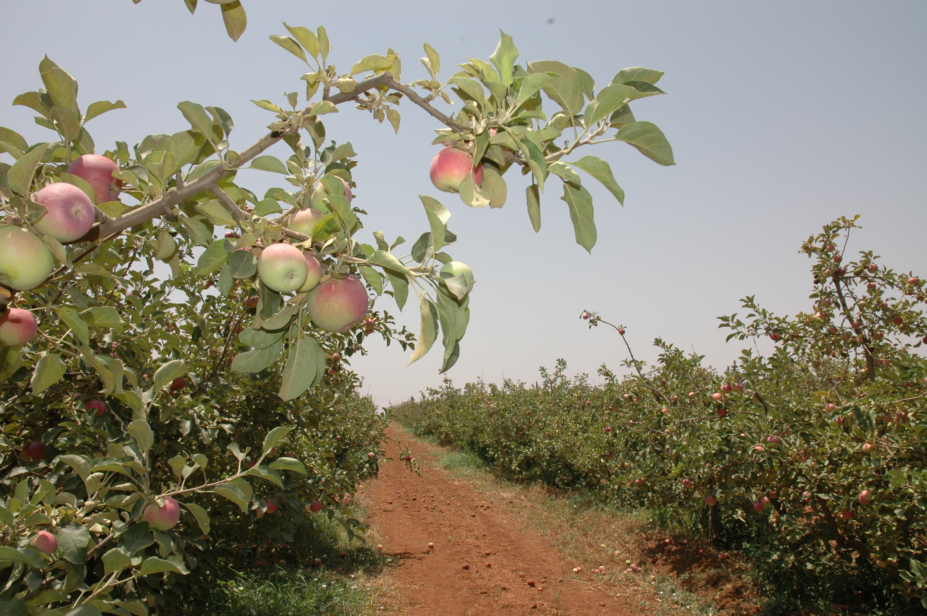 Verger de pommier dans un grand domaine de la région de Meknès Tafilalet